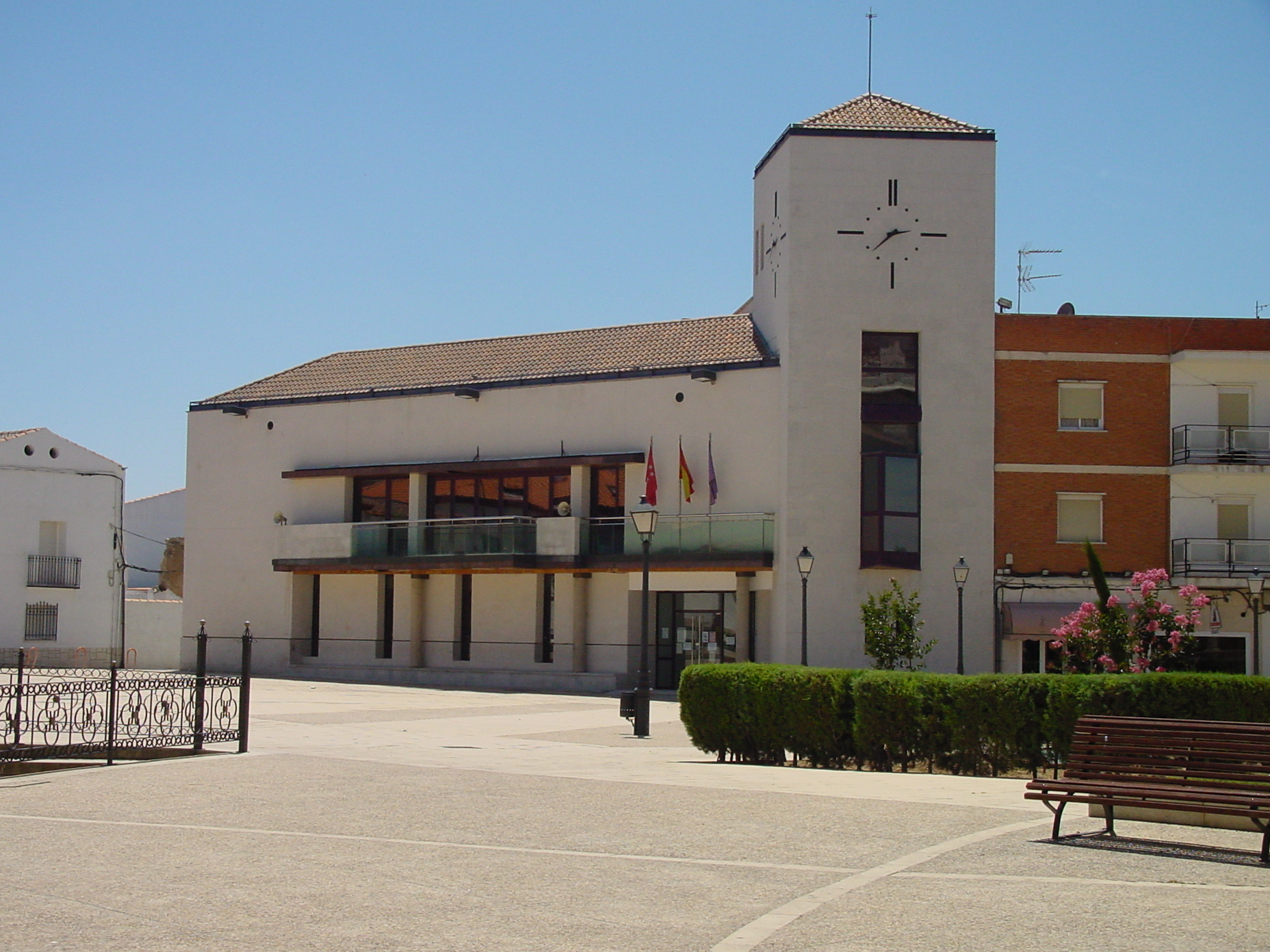 Ayuntamiento de Torres de la Alameda.